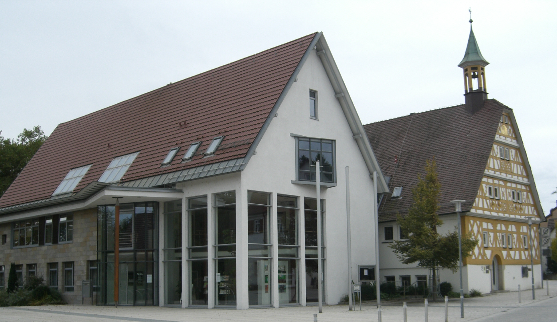 Neues und altes Rathaus von Neckartailingen